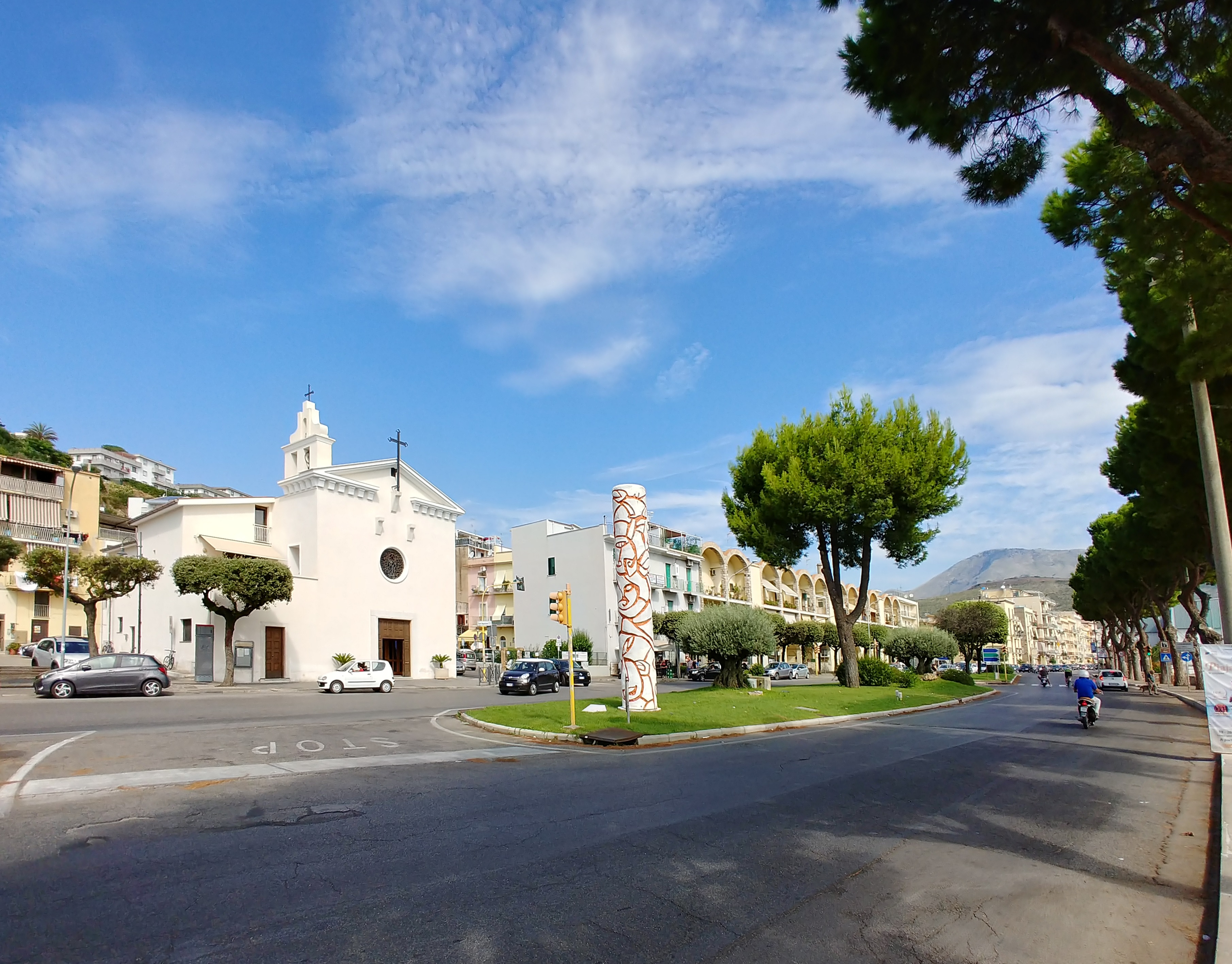 Lungomare Caboto presso l'intersezione con via Sant'Agostino.